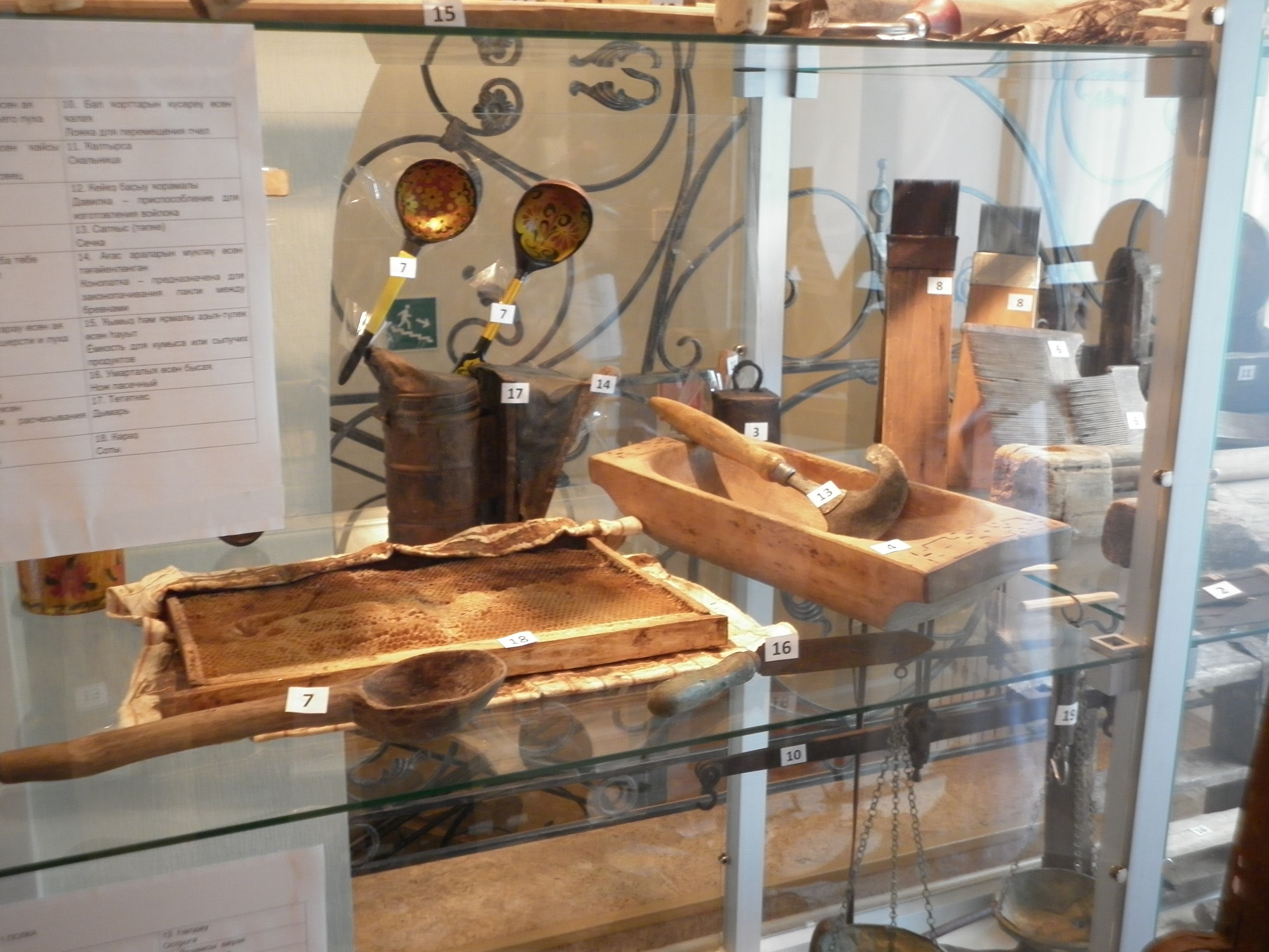 Museum_exhibits.